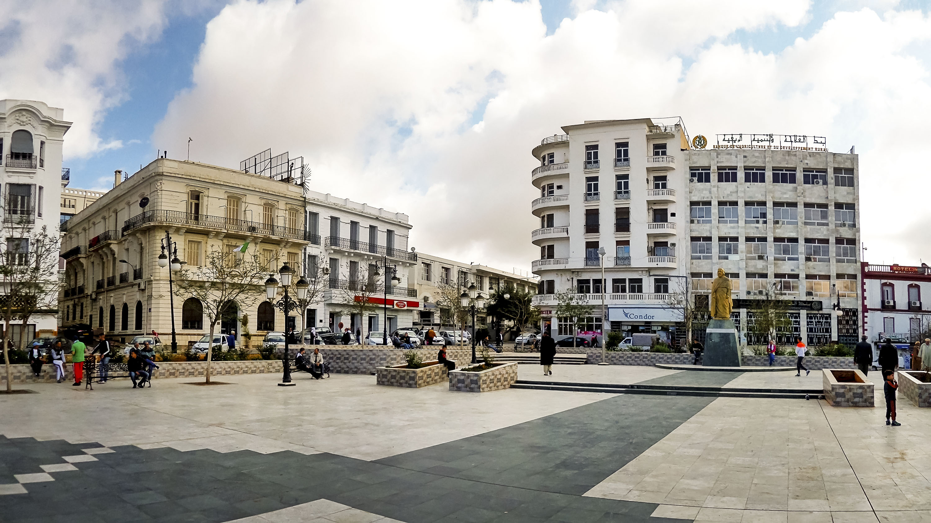 Ville de Mascara مدينة معسكر